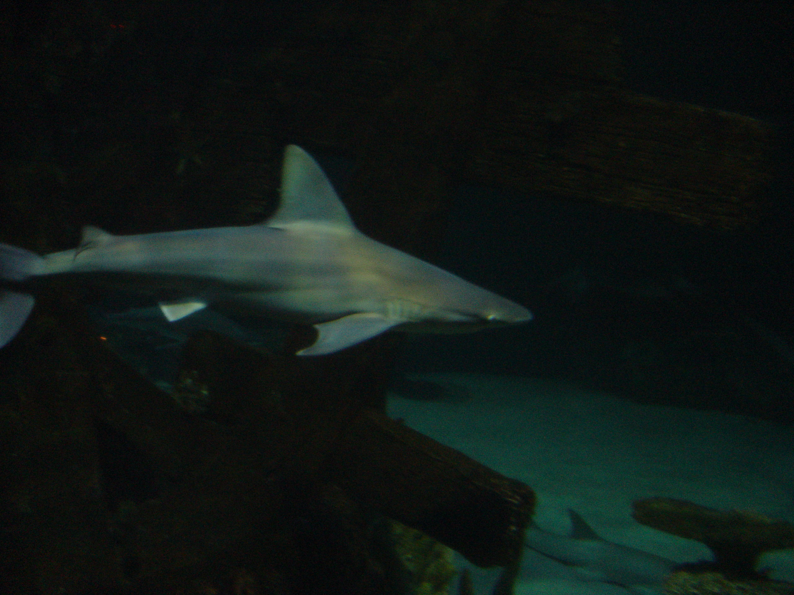 Un requin à Shark Reef. Cette photo est tirée du site : . L'adresse exacte où l'on peut trouver la photo est : L'auteur de cette photo est : Fuzzy Gerdes.